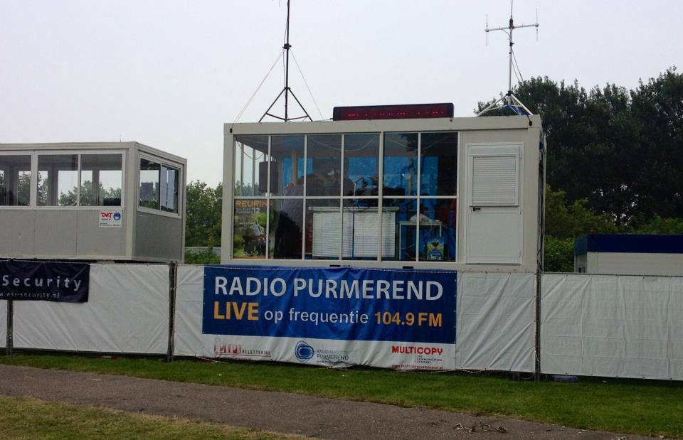 Onze studio tijdens Radio Purmerend op Reuring 2012